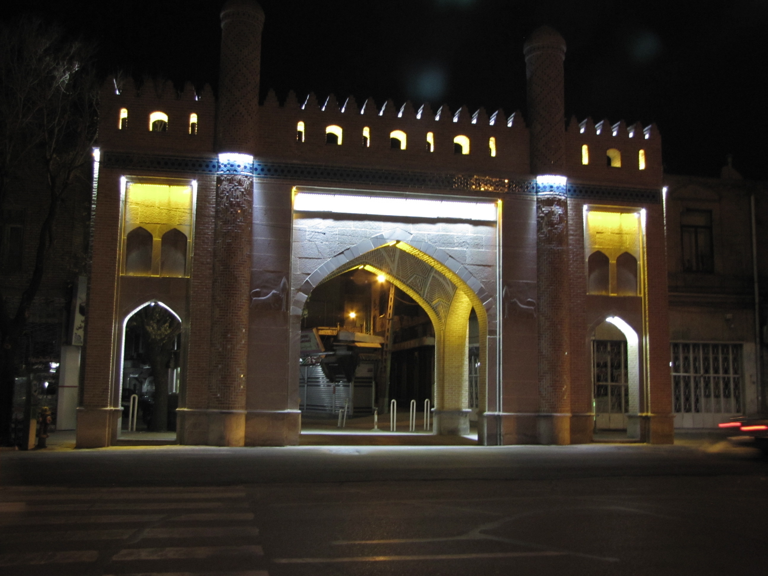 مجموعه بازار تبریز